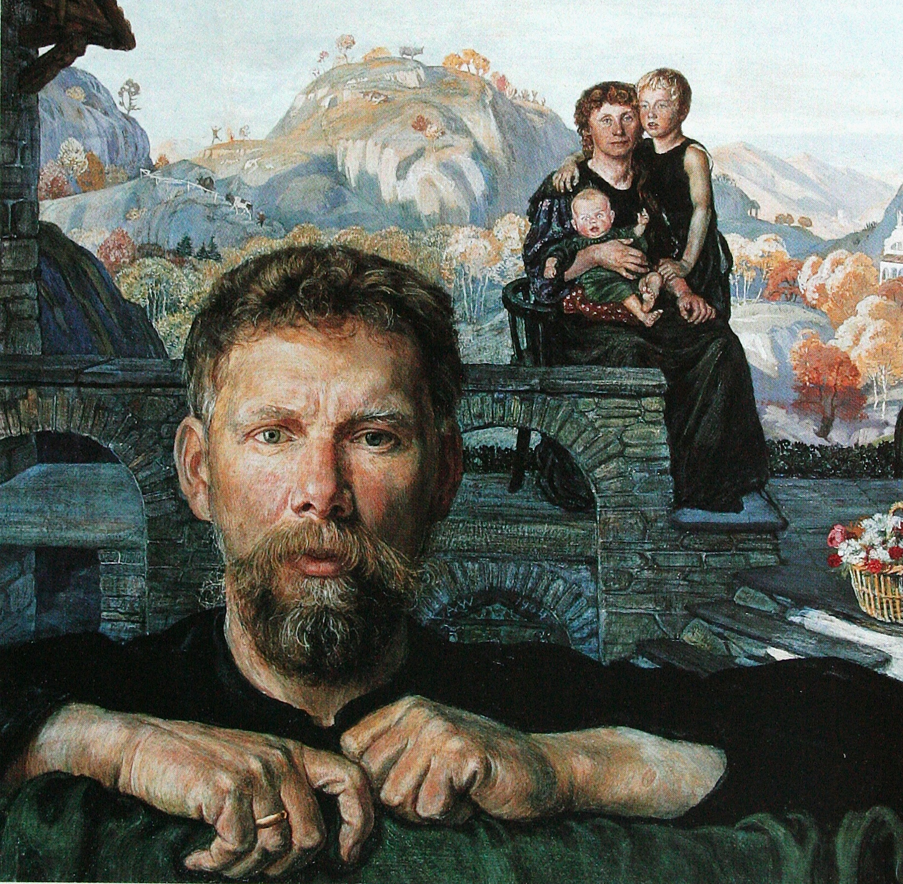 Familienbild, Gemälde von Albert Welti (1862-1912), 1903/04, 57.5 x 60.5 cm, Tempera auf Holz, Musée Cantonal des Beaux-Arts, Lausanne